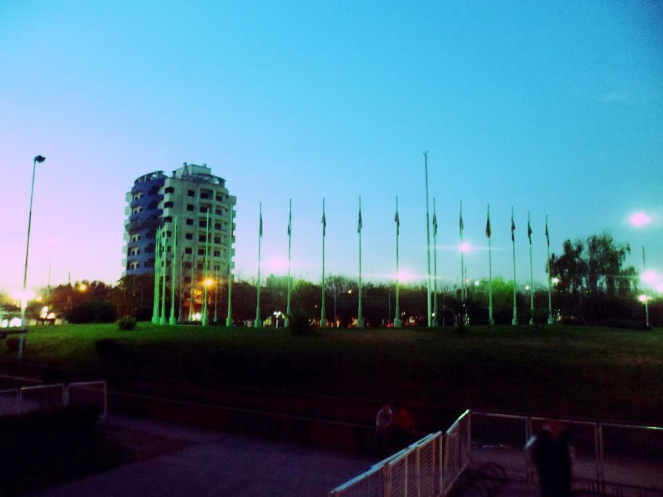 Foto de la Plaza de las Américas con el edificio Urquiza 111 de fondo. Ezeiza, Prov. de Buenos Aires, Argentina.